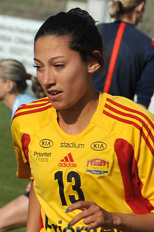 UEFA Women's Champions League 2013/14 SV Neulengbach - Tyresö FF Neulengbach, 29. März 2014 Christen Press